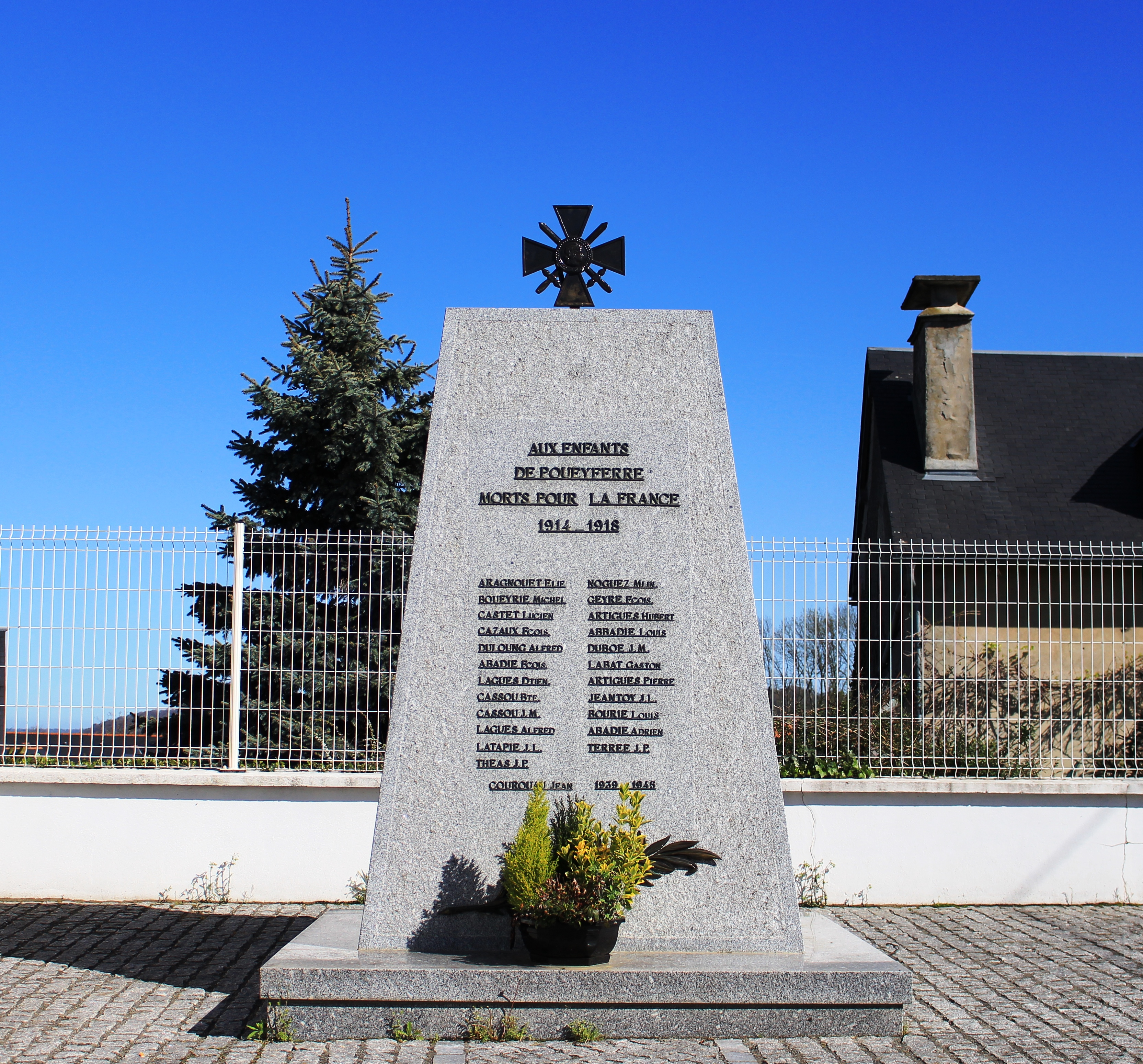 Monument aux morts de Poueyferré (Hautes-Pyrénées)